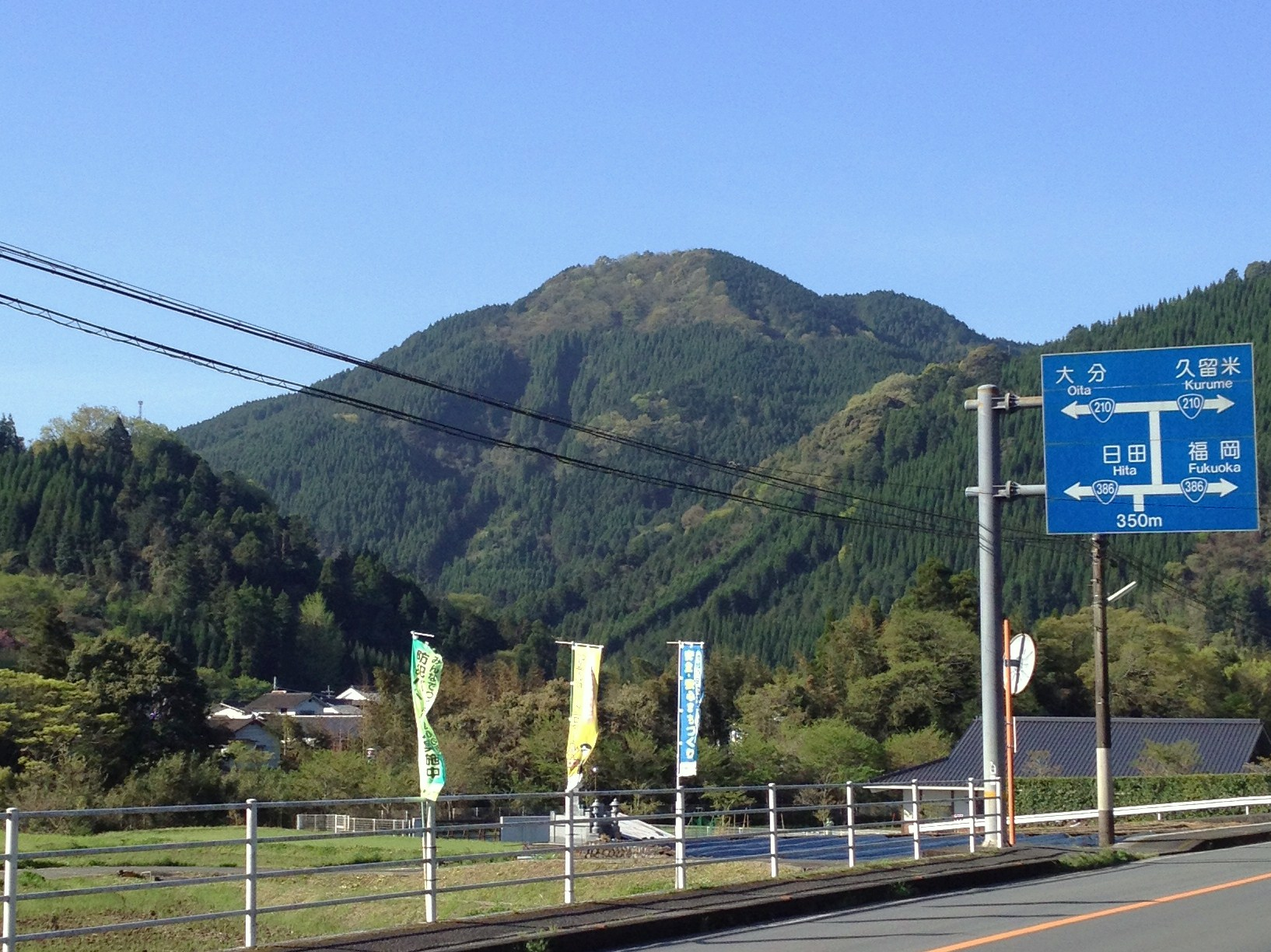 日本国大分県日田市にある高井岳（たかいだけ）。被写体の北側に位置する大肥町夜明駅付近（国道211号線）より撮影。